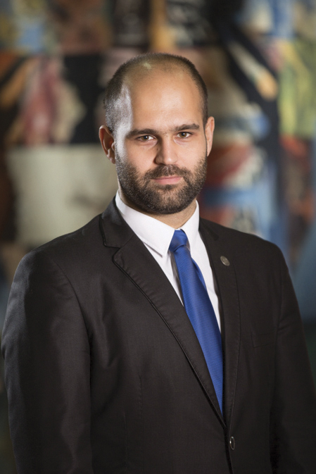 Српски (ћирилица): Милан Милутин